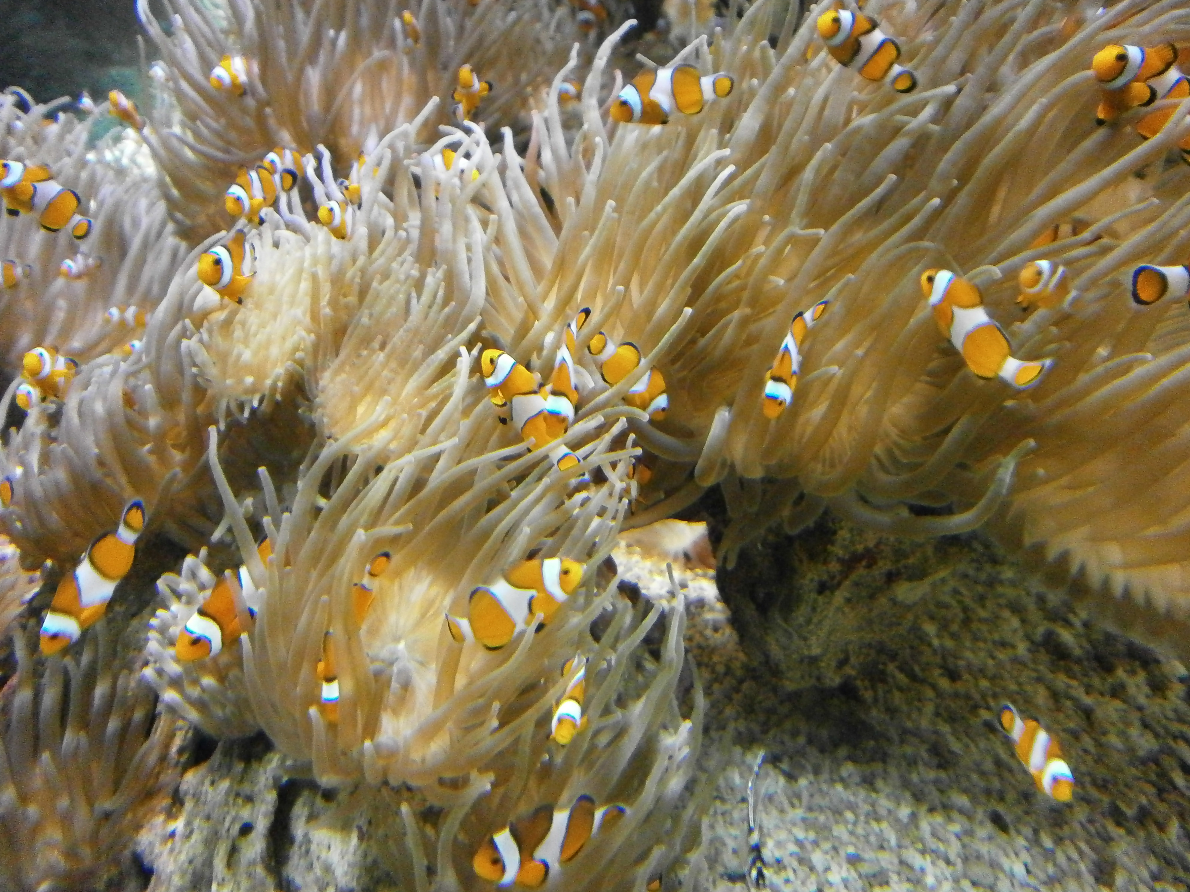 Ces poissons clown en symbiose avec leurs anémones ont été photographiés dans un aquarium du Musée Océanographique de Monaco.